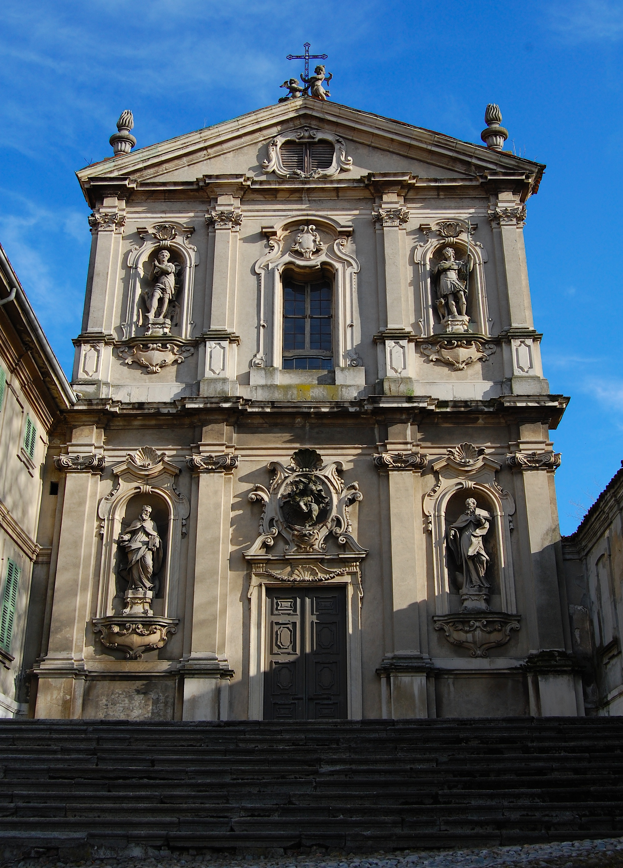 Facciata della chiesa di San Vittore a Meda (MB)